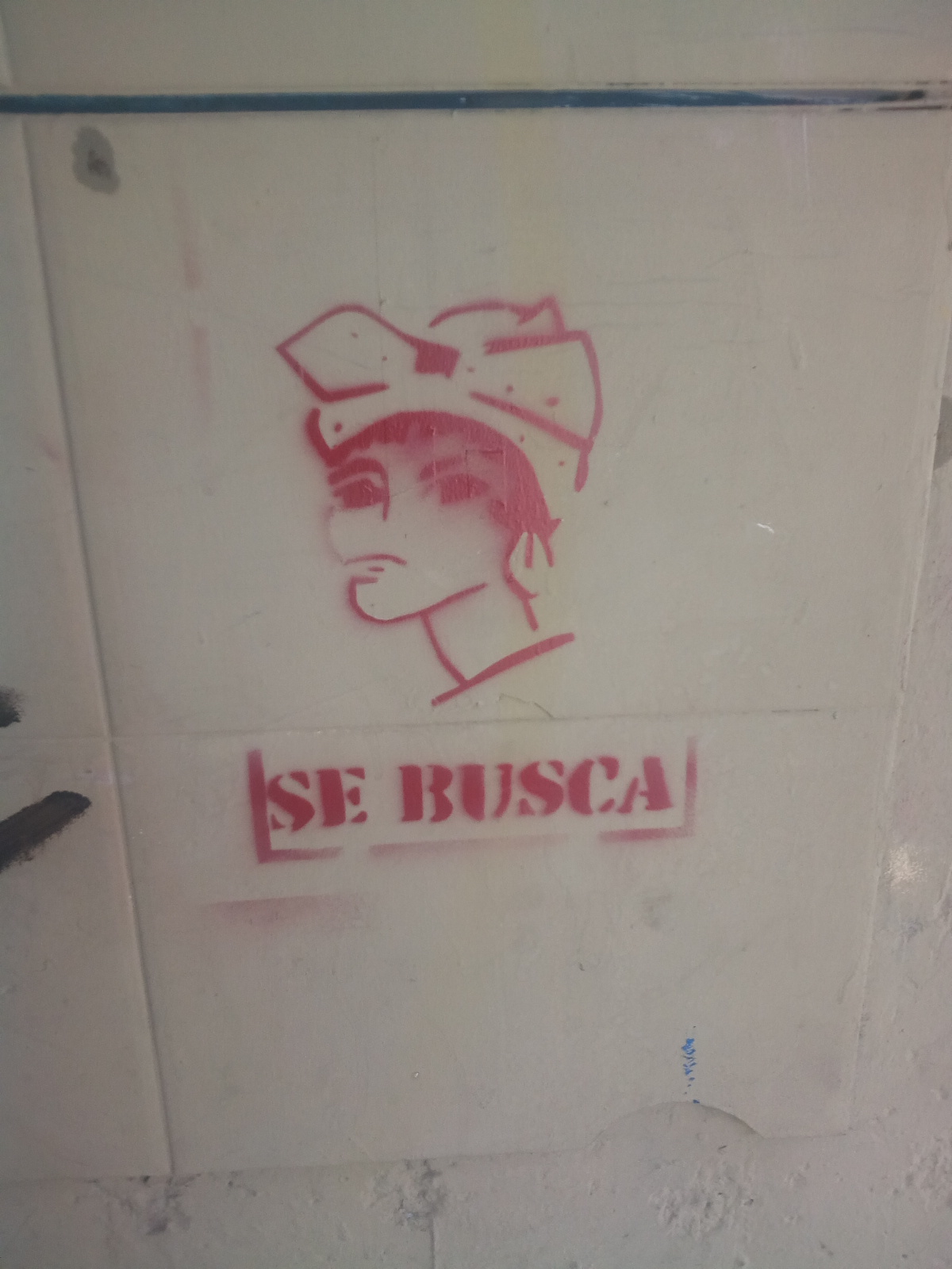 "Se Busca"